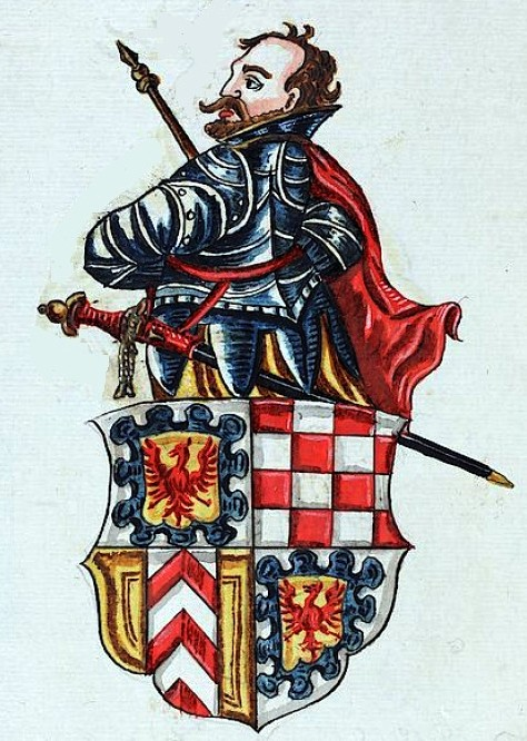 Johann Graf von Freiburg und Neuenburg